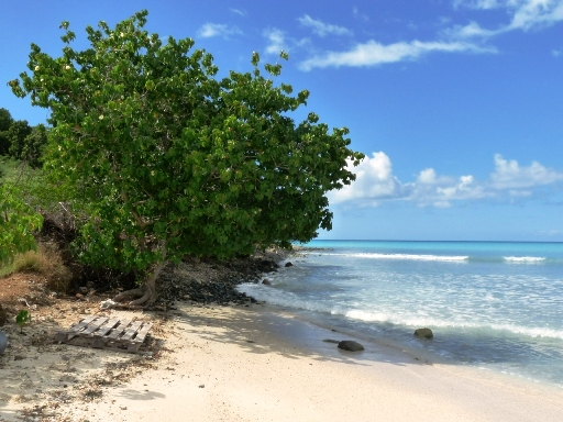 Küsten Tropeneibisch